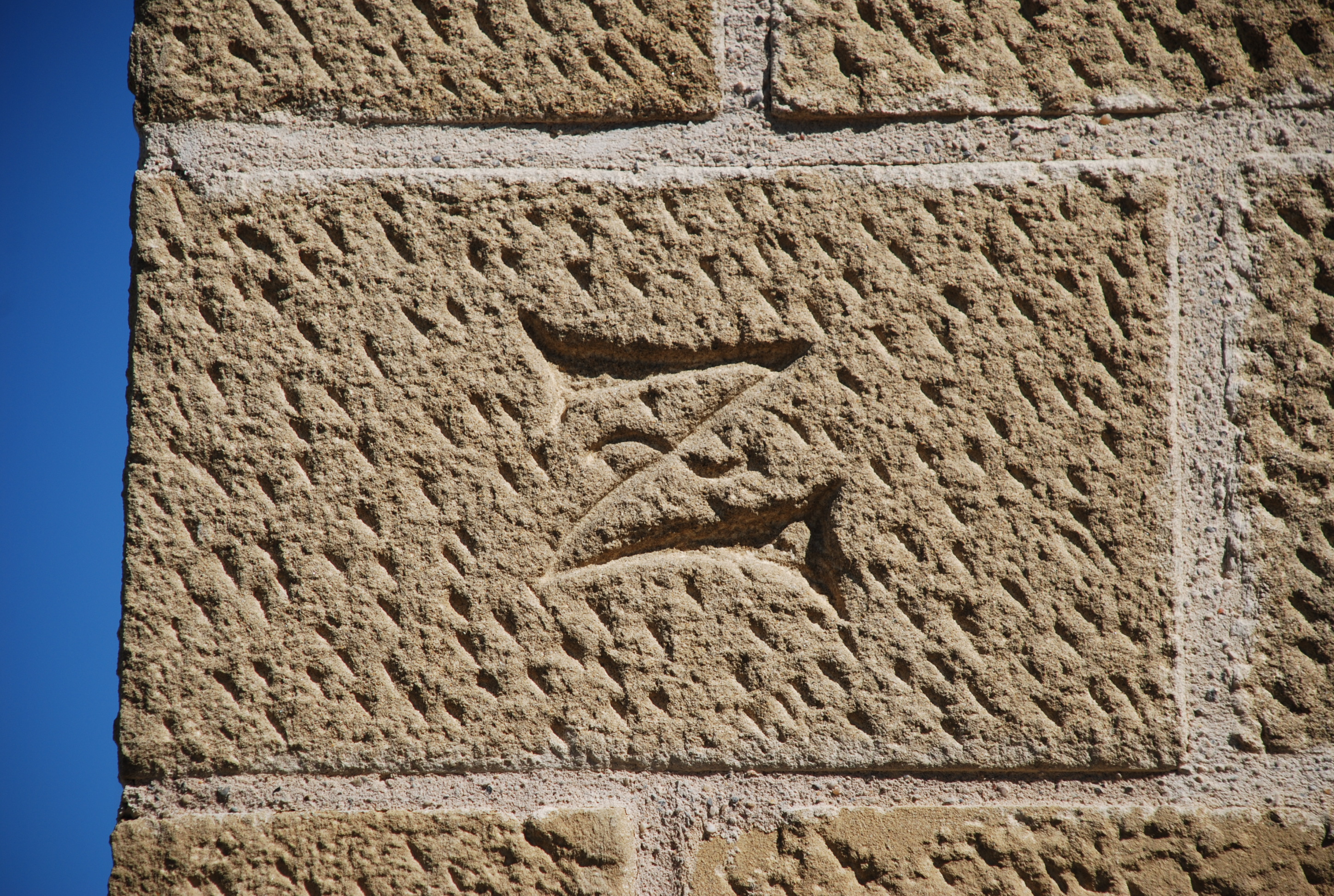 Castillo de SÁDABA (Zaragoza) España, s XIII. Marca de cantero de restauración moderna.